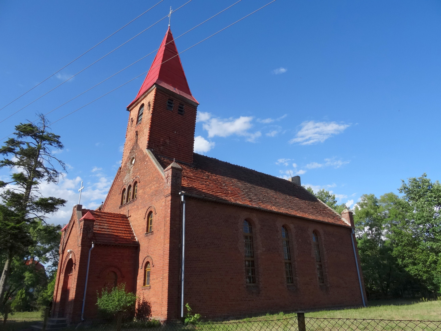 Kościół Matki Bożej Królowej Polski (1876) w Dąbrowie Wielkiej, gmina Nowa Wieś Wielka, powiat bydgoski